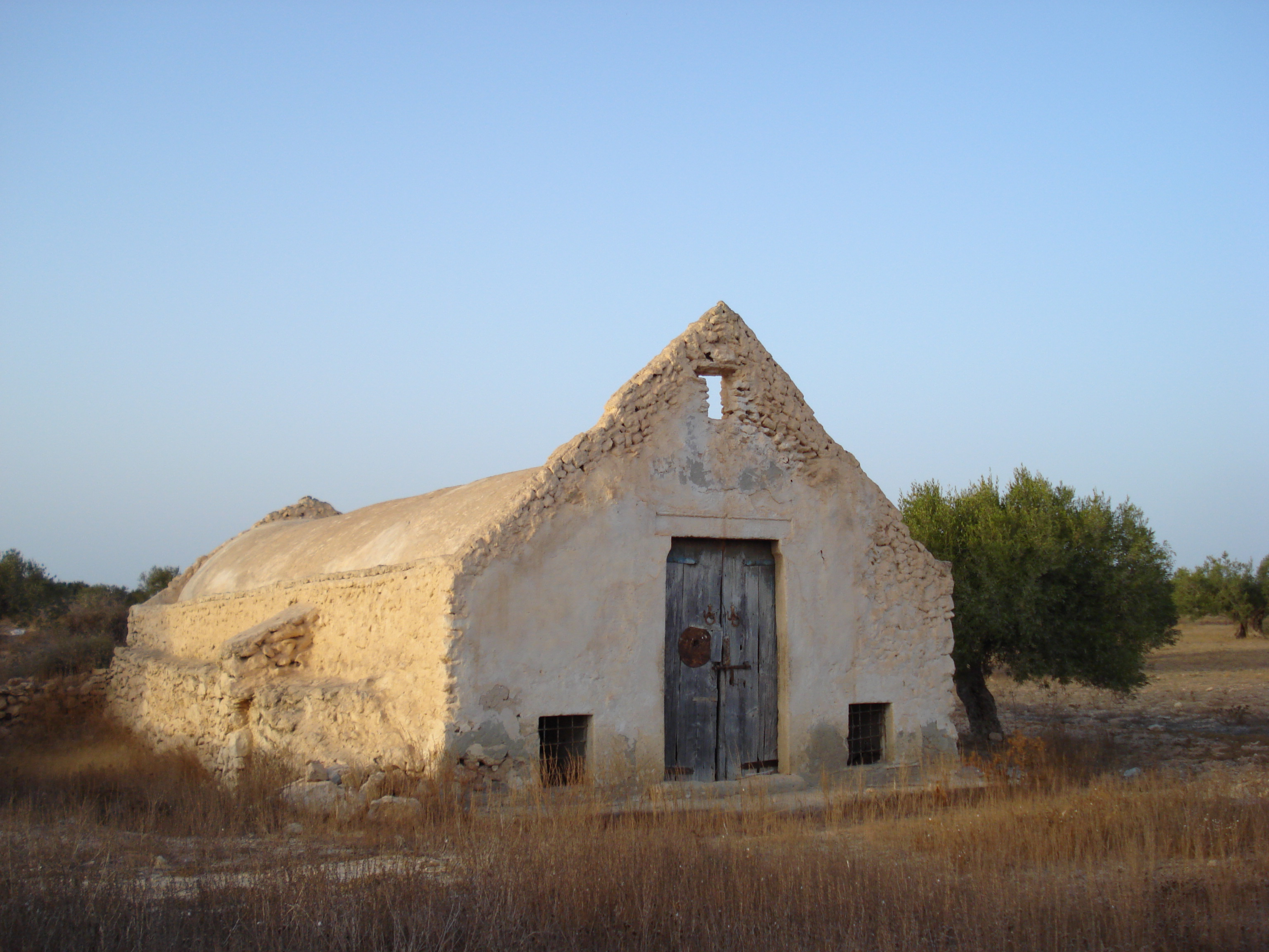 Usine traditionnelle de tissage, Erriadh, Djerba, Tunisie.